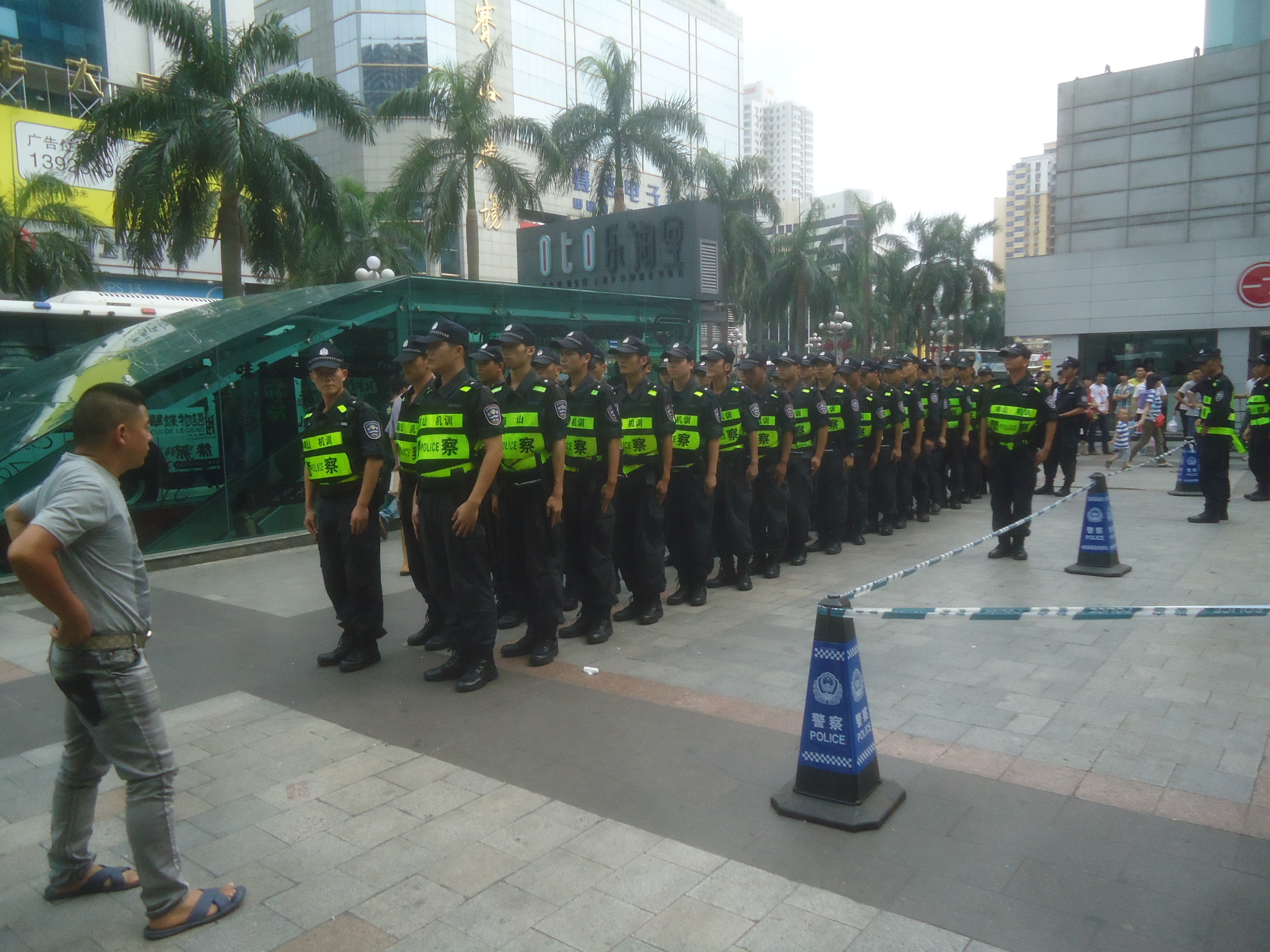 Photo prise en Chine.